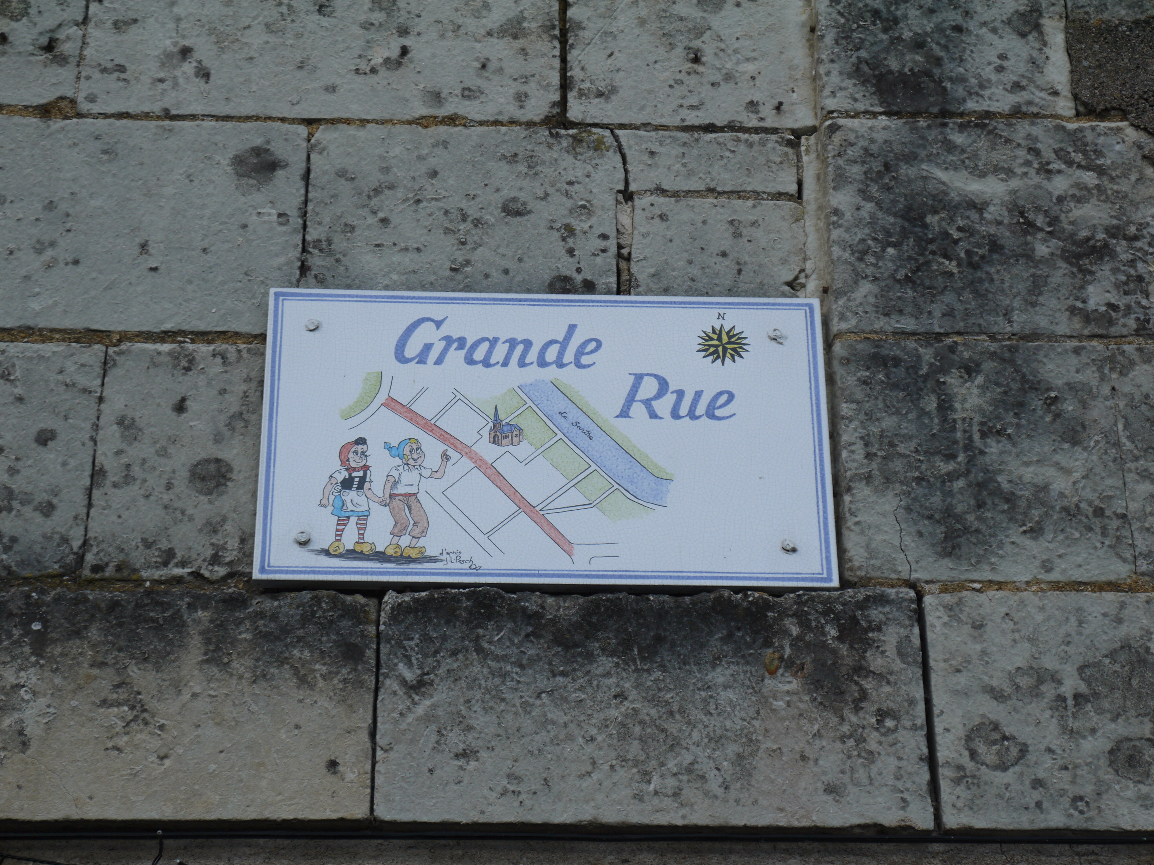 Une des plaques de rues à l'effigie de Sylvain et Sylvette, créés par Jean-Louis Pesch (originaire de la commune).